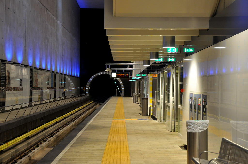 Het station ligt op een diepte van 18 meter onder straatniveau van de Statenweg en is hiermee het diepst gelegen metrostation in Rotterdam. Op 16 augustus 2010 vond de officiële opening plaats. Hiermee krijgen ook Voorburg, Leidschendam, Nootdorp, Pijnacker en Berkel en Rodenrijs een rechtstreekse verbinding met het centrum van Rotterdam. Er is één spoor in gebruik genomen worden, ingebruikname van het tweede spoor is voorzien voor 2011. Het station ligt aan de Rotterdamse metrolijn E (Rotterdam Centraal - Den Haag Centraal). De treinen rijden tot 2011 om het kwartier met extra lange treinstellen, daarna om de 10 minuten. De rit van CS naar CS duurt ca 30 minuten. In het Rotterdamse tracé (Statenwegtracé) zit een tunnel van 2,3 km lengte.